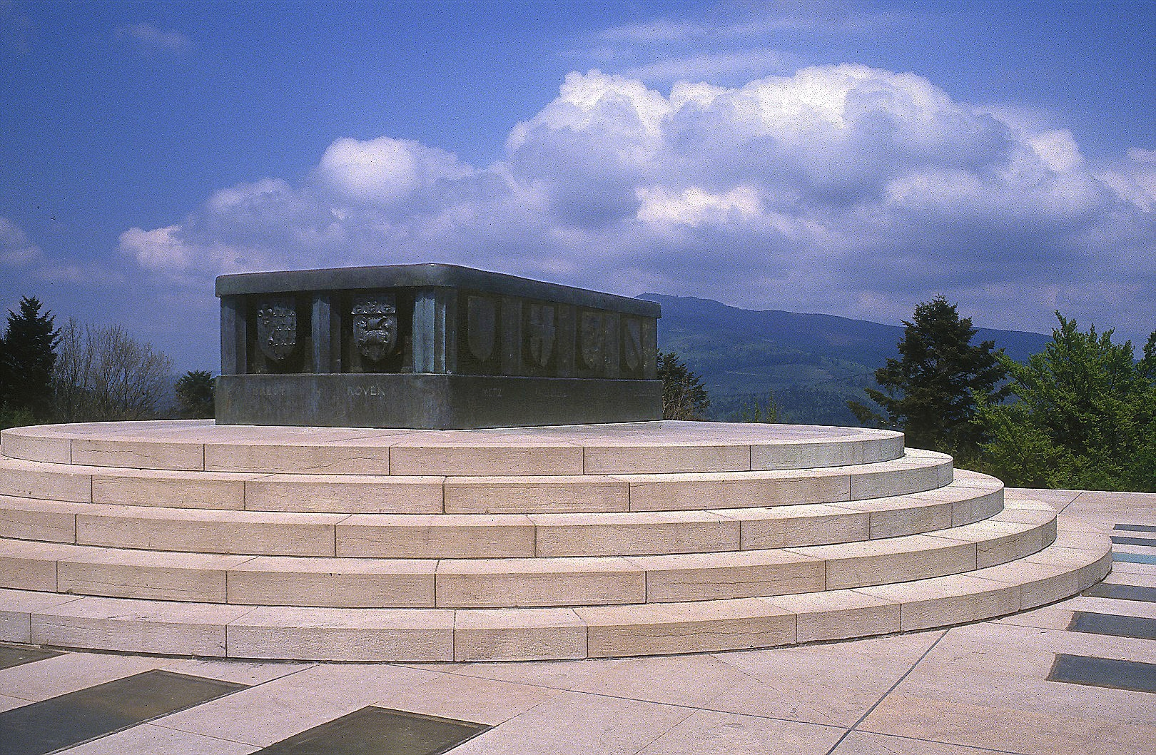 Gedenkstätte Hartmannswiller Kopf.